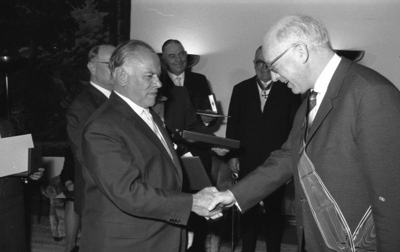 Empfang und Ordensverleihung an Bundestagsabgeordnete durch Bundestagspräsident Dr. Gerstenmaier Bonn (vorne v.l.n.r.: Gerstenmaier, Erler)